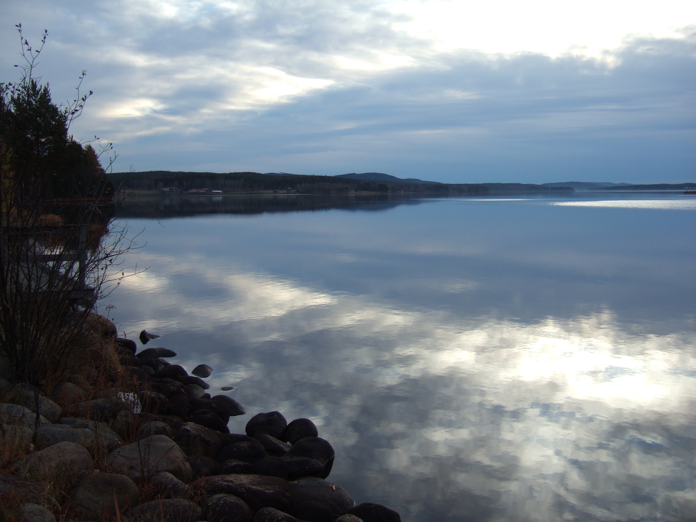 The lake Varpen in Bollnäs, Hälsingland, Sweden